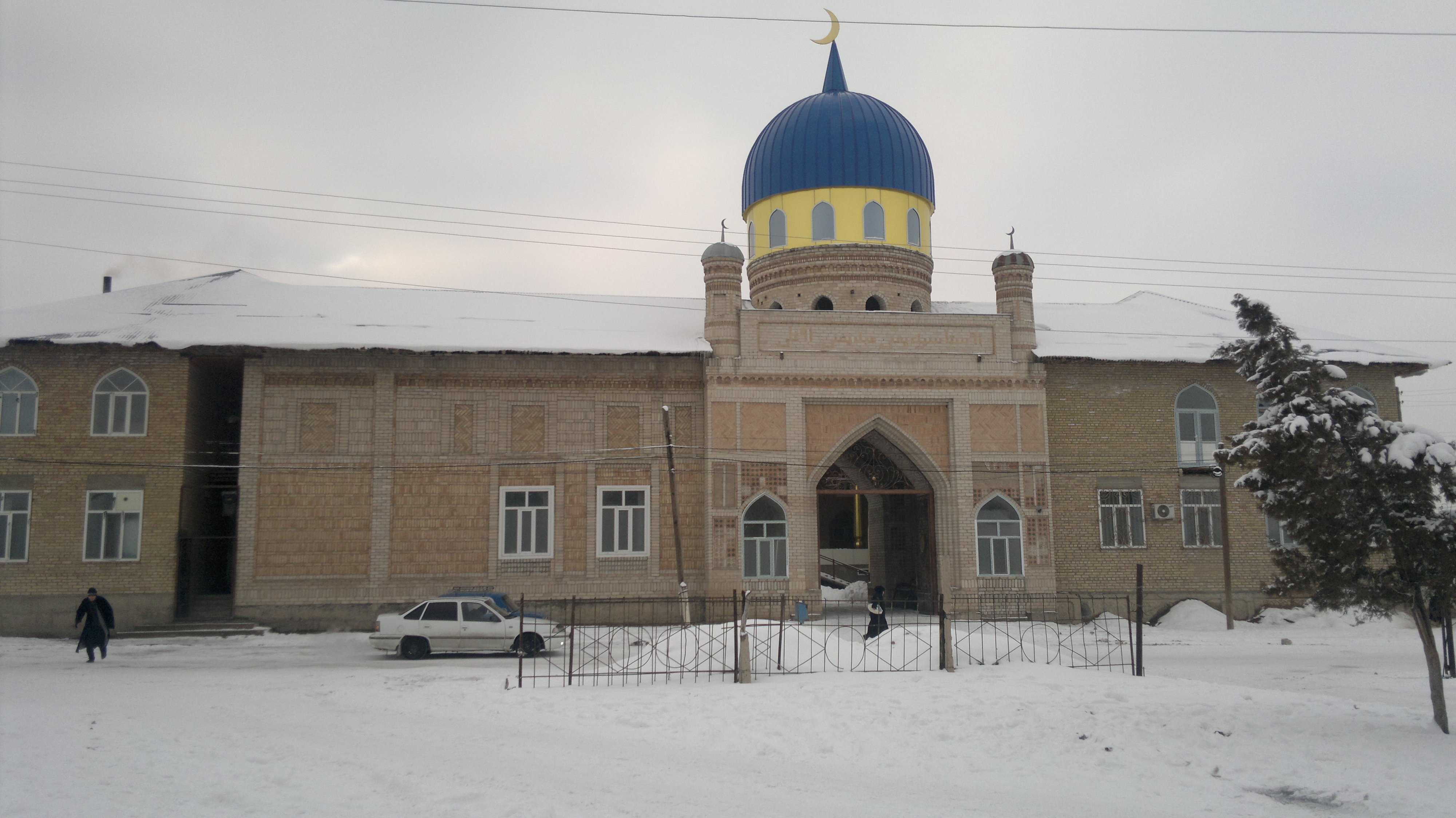 Oʻzbekcha/ўзбекча: My OWN WORK